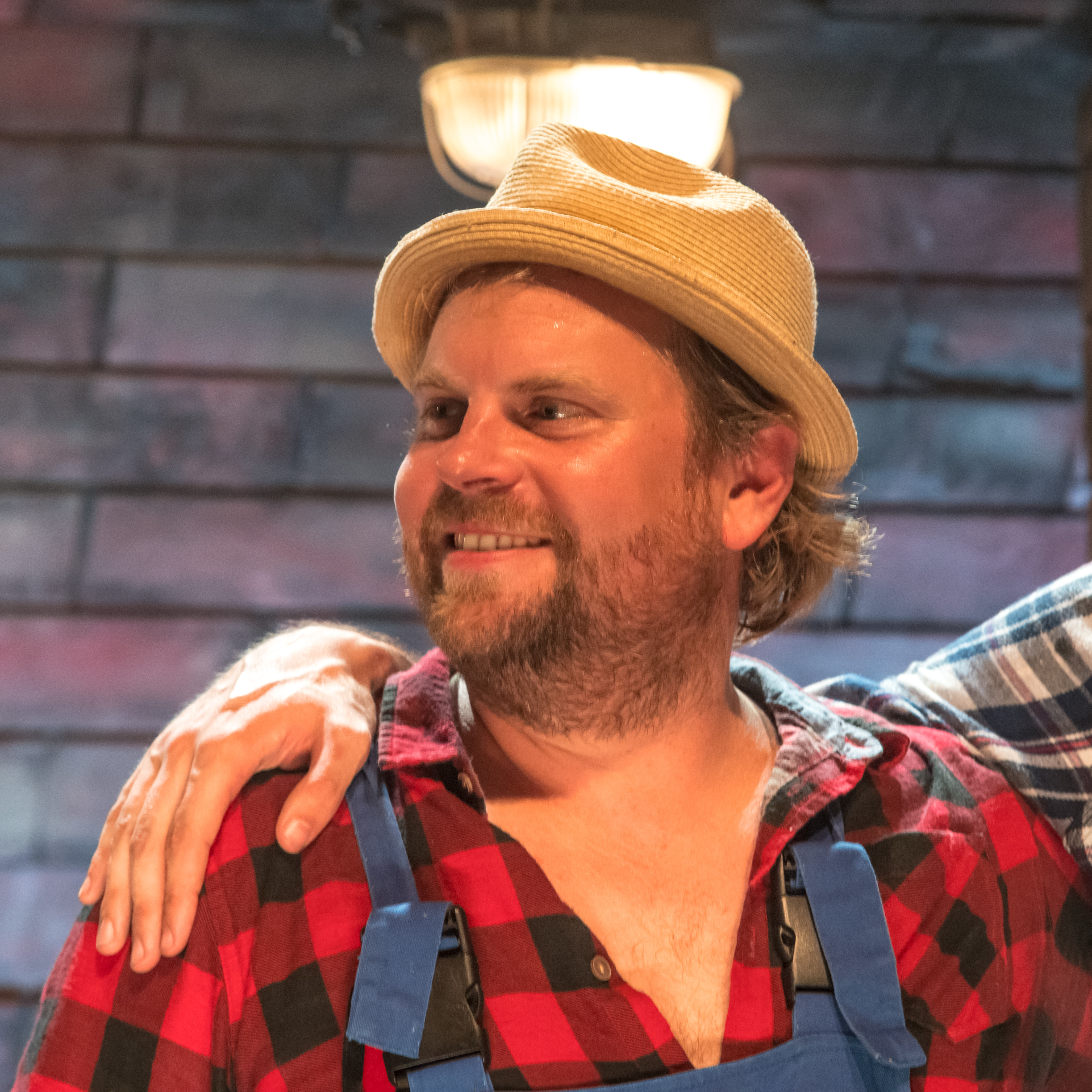 Bilder vom Zelt Musik Festival 2018 in Freiburg im Breisgau Auftritt Alligatoah und Sebel am 20. Juli 2018 im Zirkuszelt